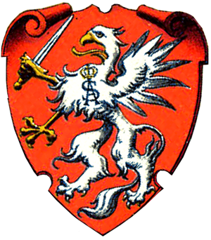 Титульна сторінка «Балтійського гербовника». Герб Лівонського герцогства (XVI століття)